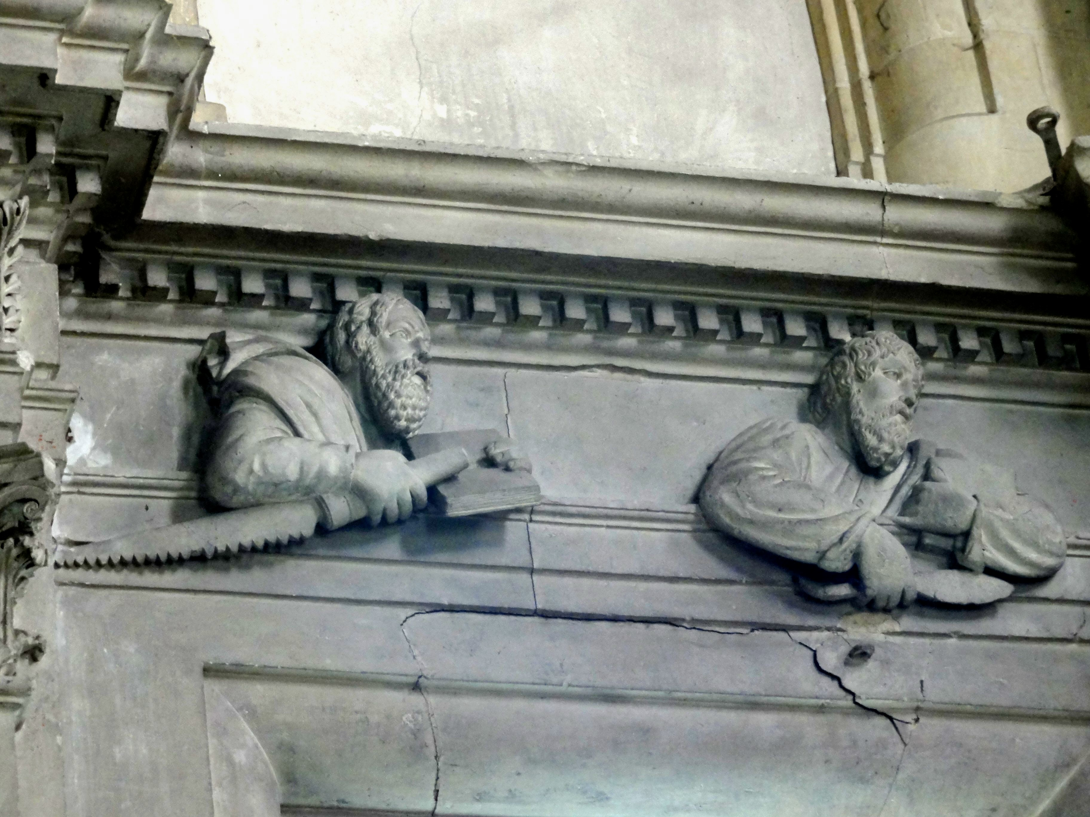 Frise des Apôtres : Simon le Zélote et Barthélémy.